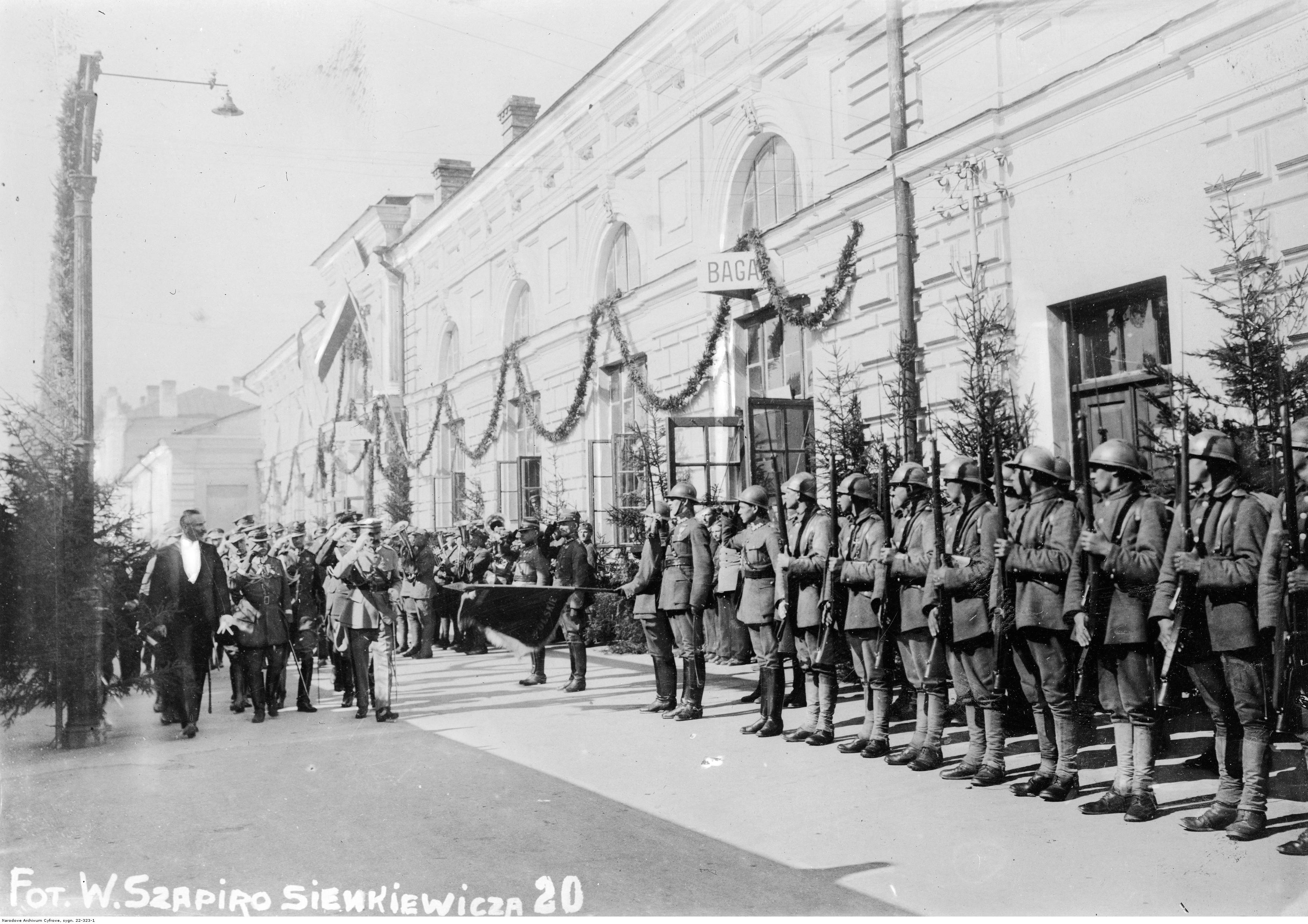 Marszałek Józef Piłsudski przechodzi przed frontem kompanii honorowej, witającej go na dworcu kolejowym. Widoczny także m.in. prezes Rady Miejskiej w Białymstoku Feliks Filipowicz (idzie 1. z lewej, trzyma białe rękawiczki).